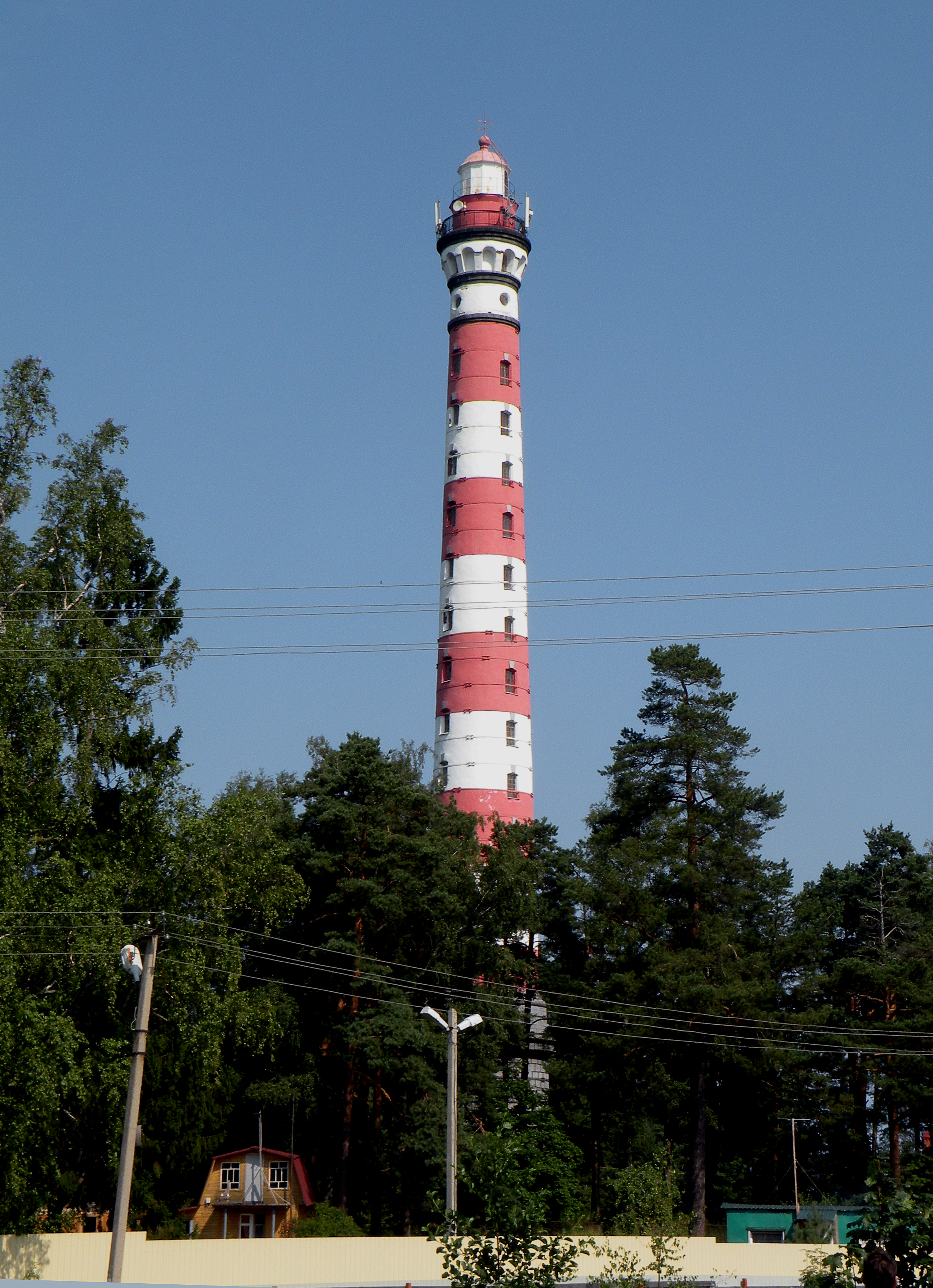 Ладожское озеро.Маяк Осиновец.